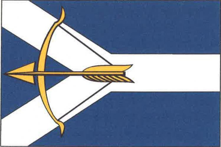 Tuřany CH vlajka